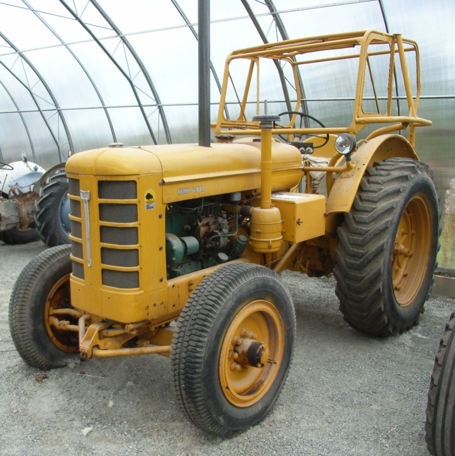 BM Volvo 470 I Bison. Traktoren er utstilt på Norsk traktor og motormuseum i Stokke i Vestfold.